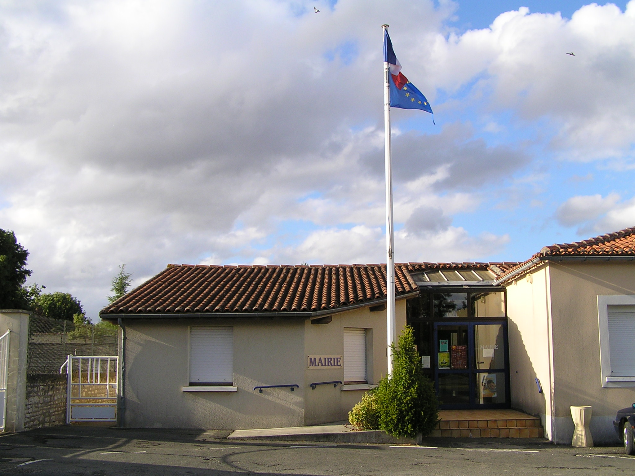 mairie de Jauldes